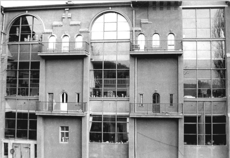 ADN-ZB-Häßler-25.4.84-Dresden: Künstlerhang rekonstruiert. Das Atelierhaus des Dresdener Künstlerdomizils am Löschwitzer Elbhang wurde in den zurückliegenden Jahren umfangreich rekonstruiert. Diese Wohn- und Arbeitsstätte für Maler und Bildhauer ist die Einzige ihrer Art in der DDR. Gebaut wurde sie 1897-98 nach Entwürfen des Dresdener Architekten Martin Pietzsch. Zum Haus gehören 17 Ateliere und 13 Wohnungen. Unter den Mietern sind Namen bekannter Künstler wie Josef Hegenbarth, Hans Unger, Sascha Schneider und Hans Jüchser.